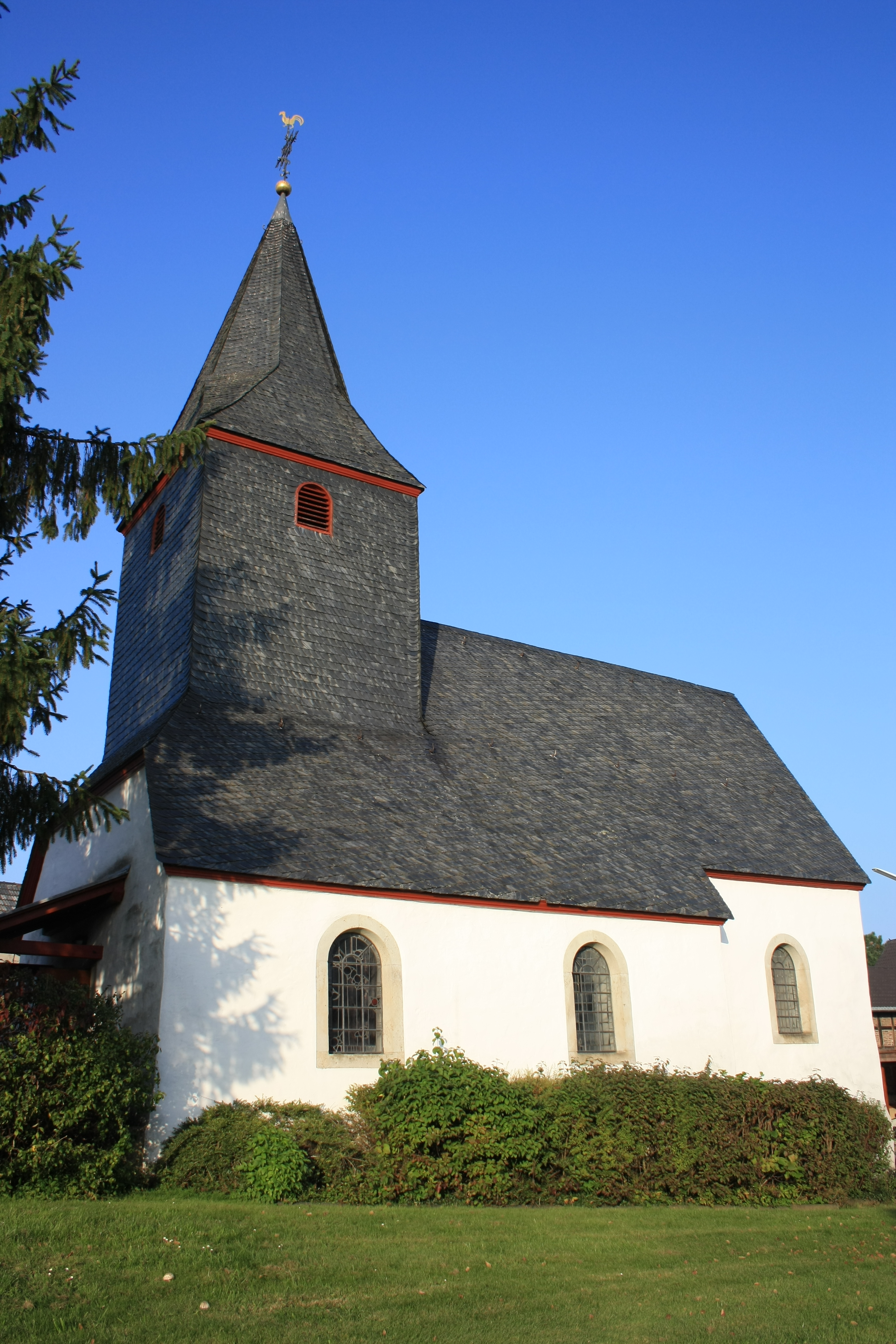 Kapelle St. Jakobus in Werthhoven, Südansicht